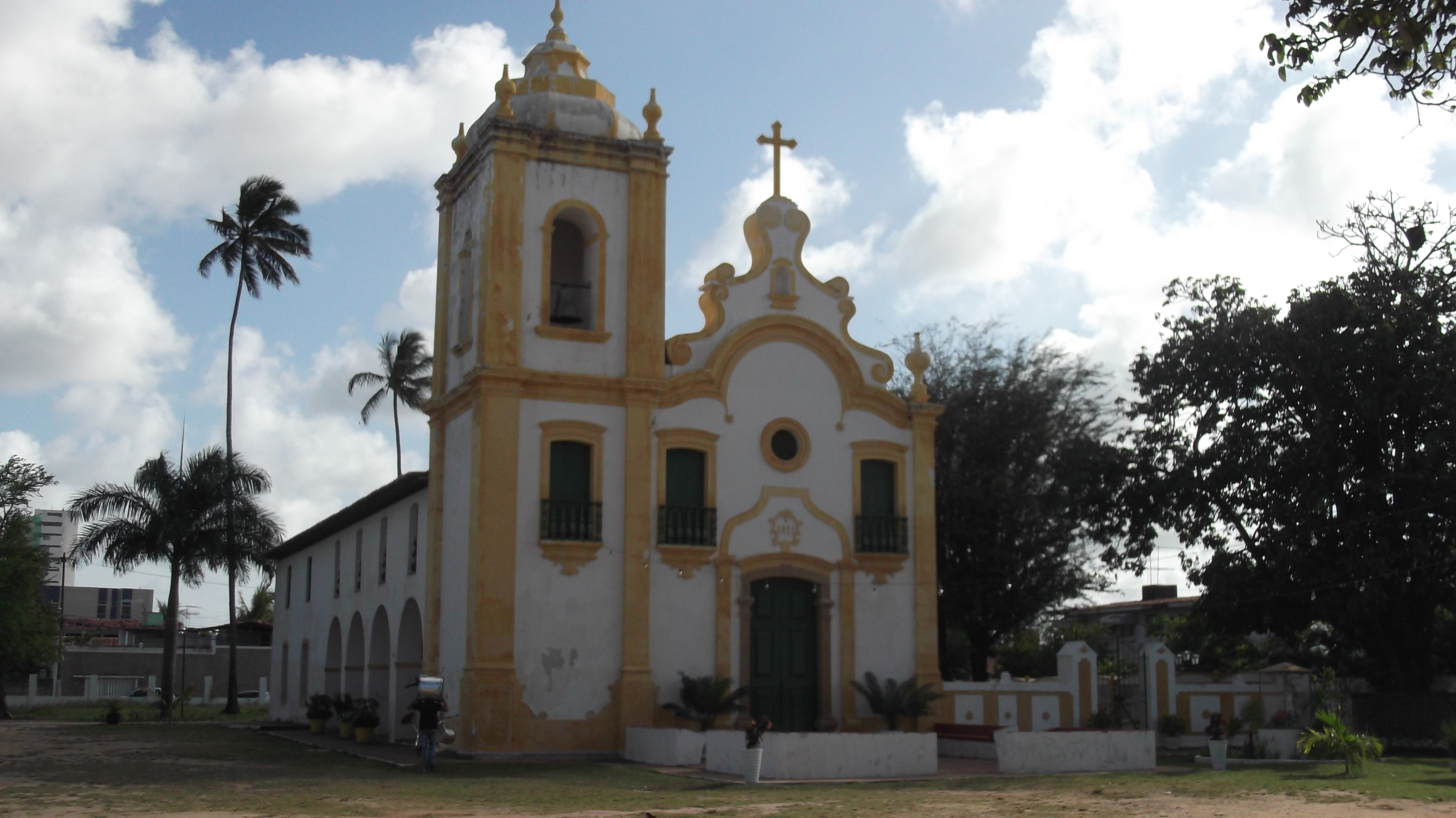 Teatro Santa Isabel